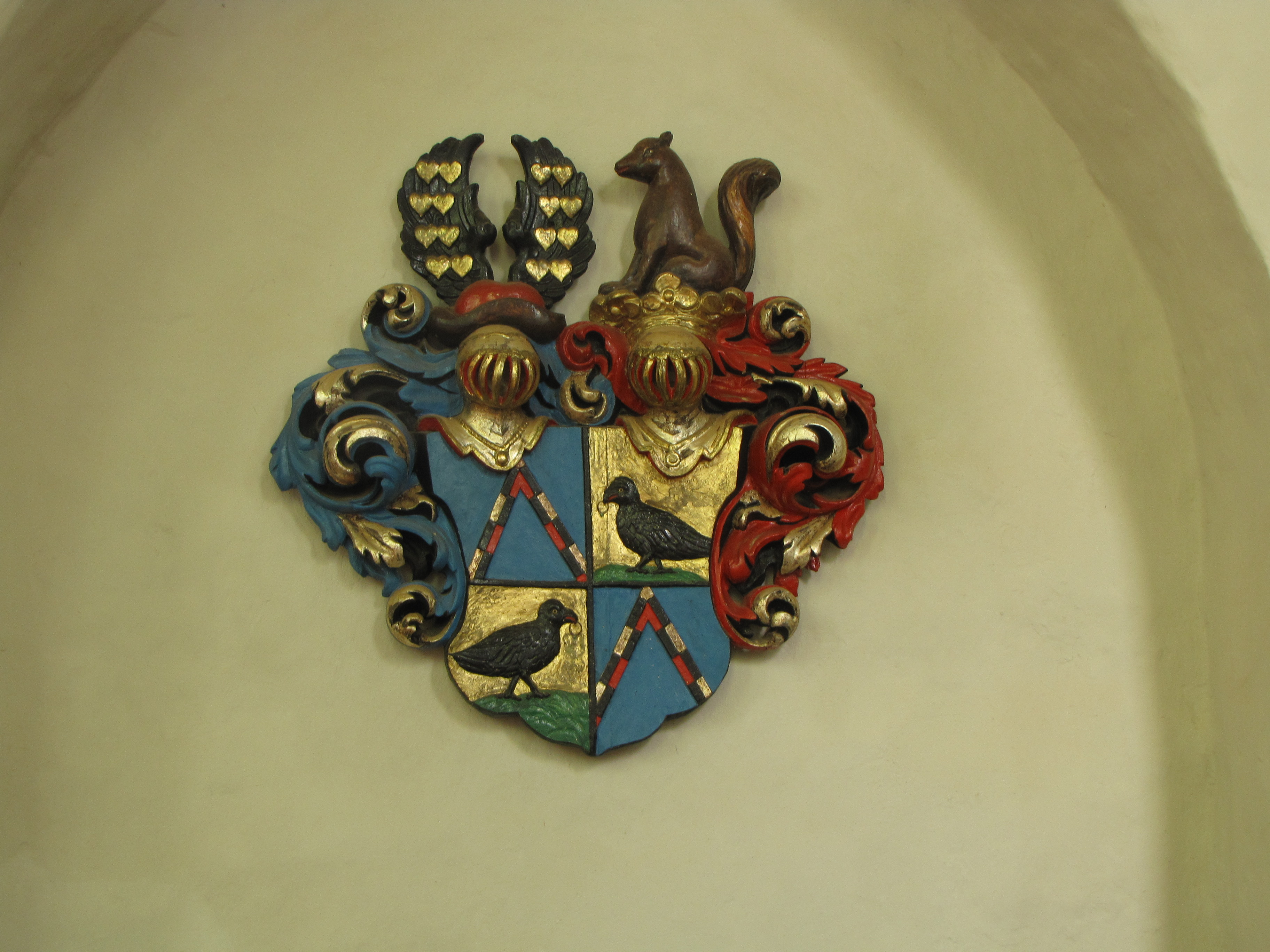 Wappen der v. Trott in der Klosterkirche Himmelpfort, Ortsteil Himmelpfort, Stadt Fürstenberg/Havel, Lkr. Oberhavel, Brandenburg